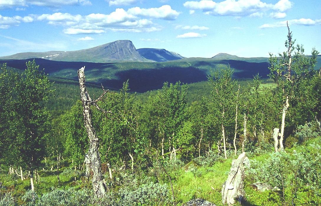 Blick ins Tärnagebirge im Vindelfjäll-Naturreservat, Schweden